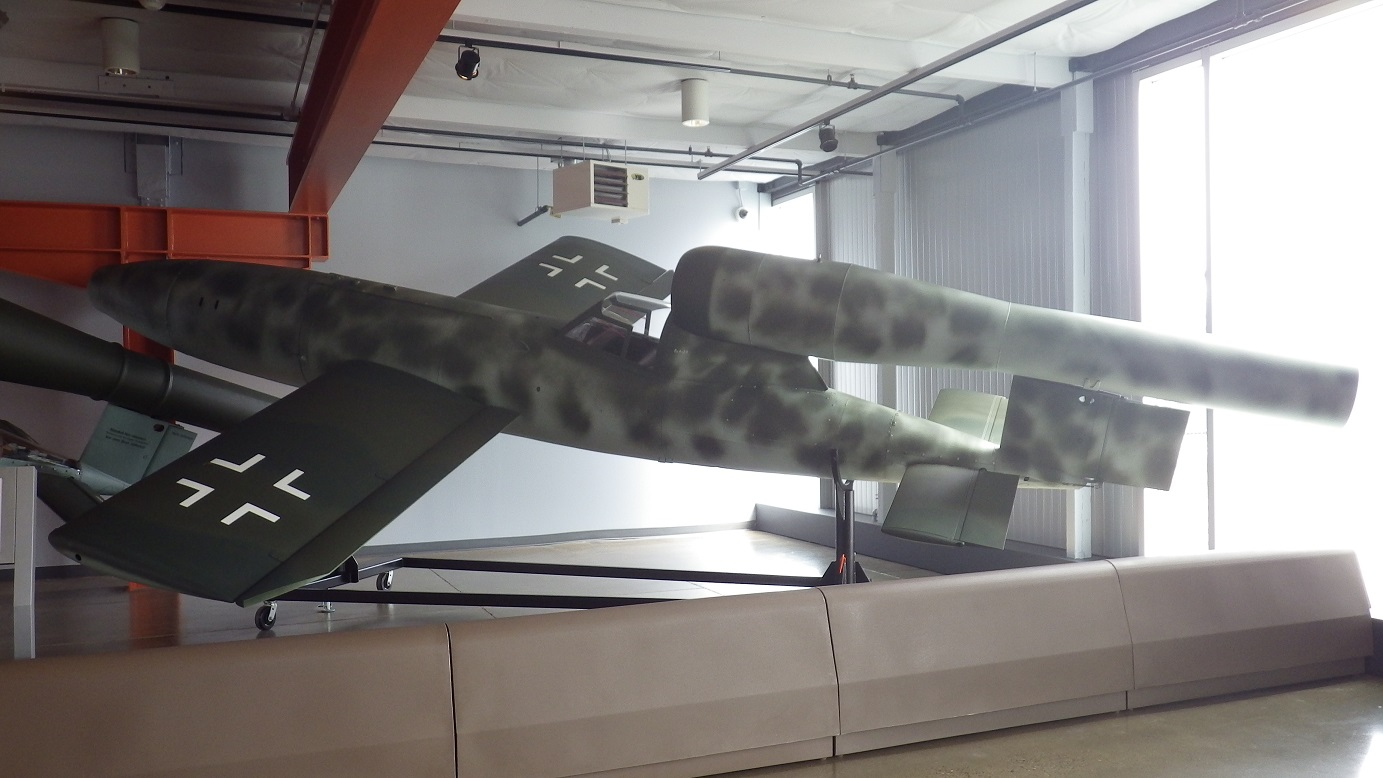 Fieseler Fi 103R Reichenberg Flying Heritage Collection